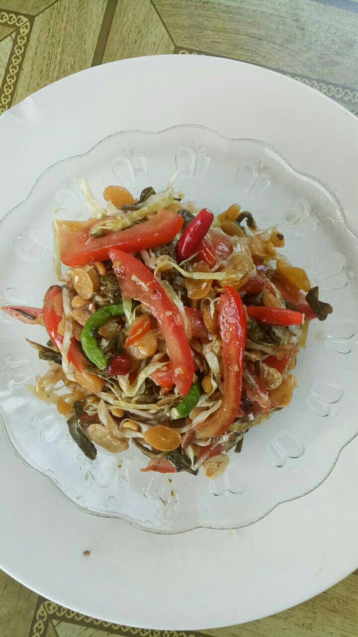 緬甸傳統食物：茶葉拌豆